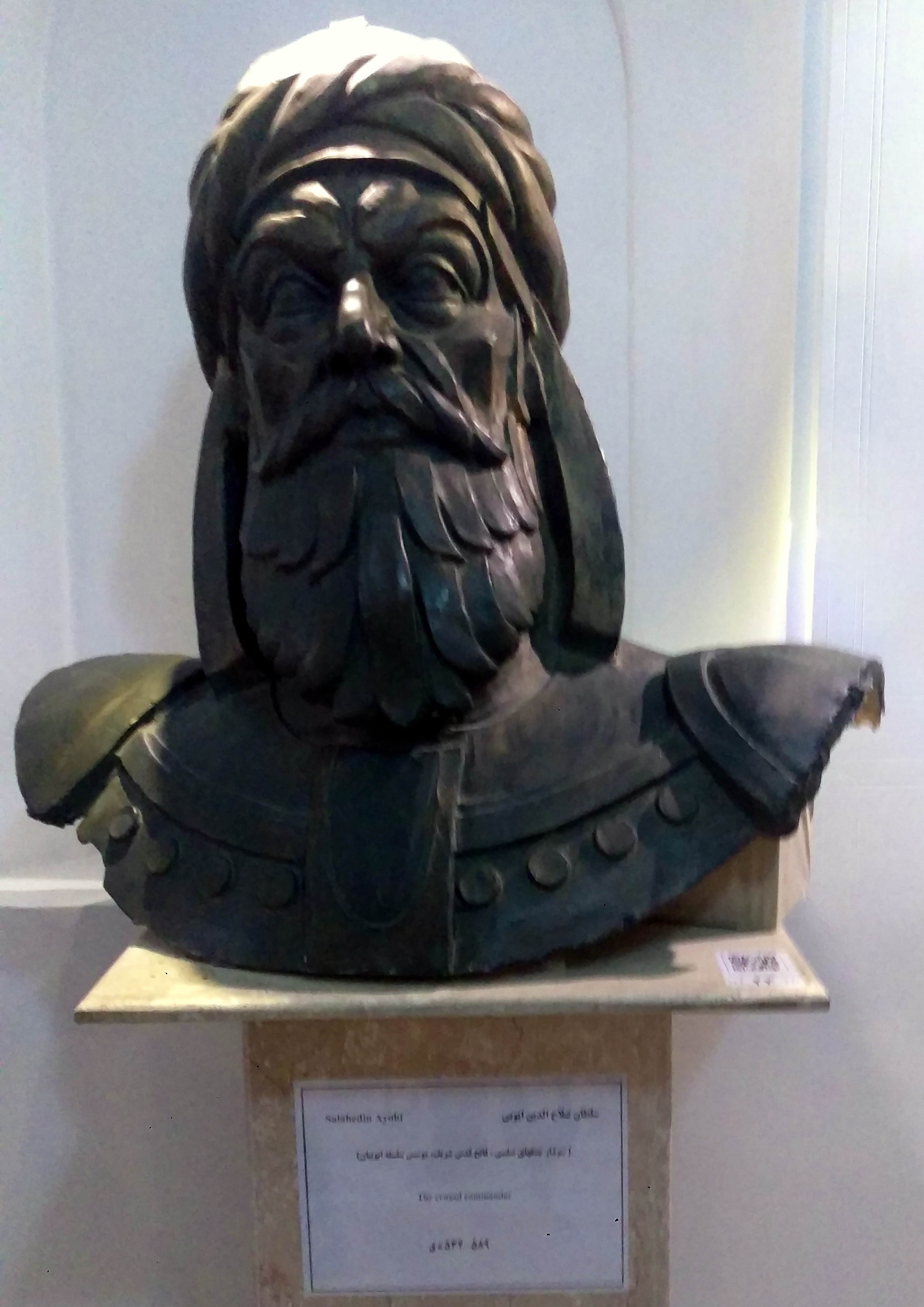 سردیس صلاح الیدن ایوبی - مستقر در عمارت آصف که با نام خانه کرد در سنندج